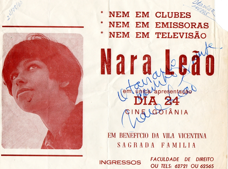 panfleto de show de nara leão em 24/08/1965 na cidade de goiania-go